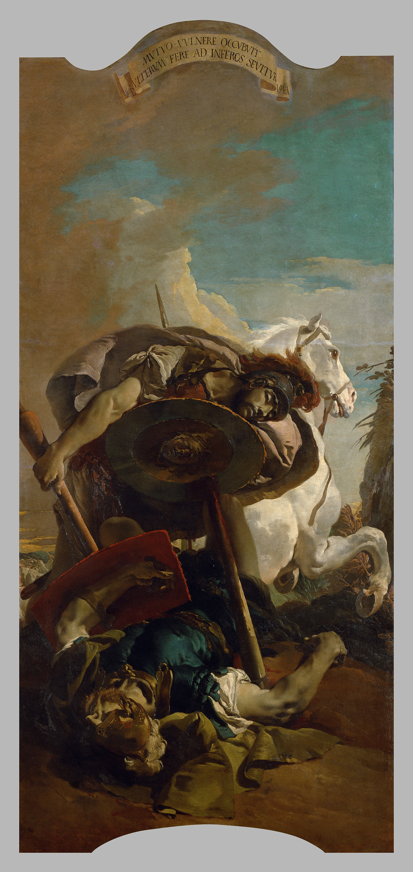 L. J. Brutus (erster Konsul Roms) und Aruns (Sohn des gestürzten letzten römischen Königs Tarquinus Superbus) töten sich gegenseitig im Zweikampf